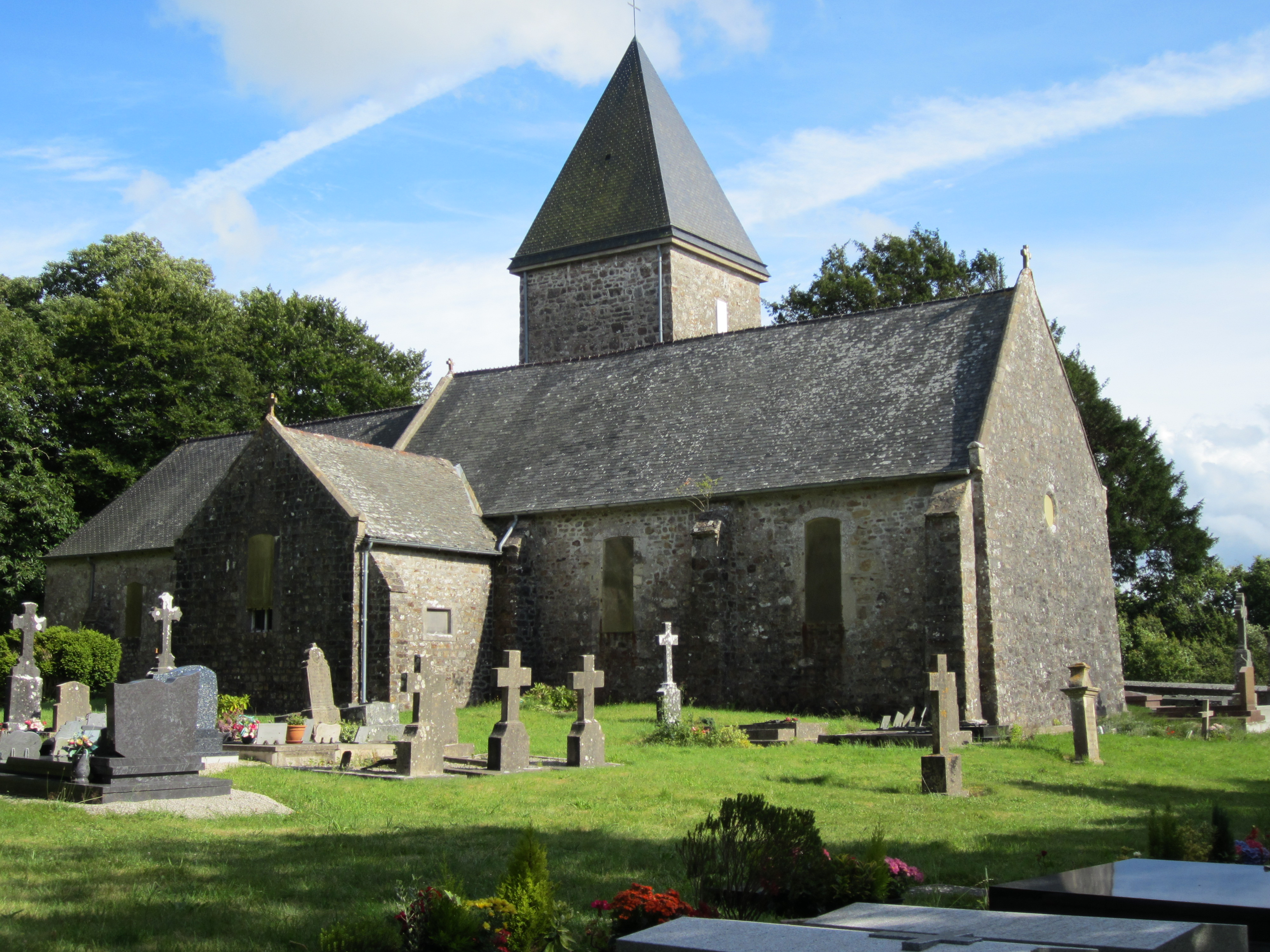 Église Saint-Jean-Baptiste de Taillepied (située sur la commune de Saint-Sauveur-le-Vicomte)